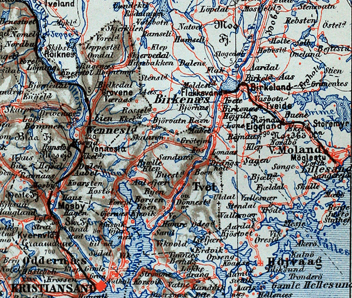 Kart over Lillesand-flaksvandbanen.